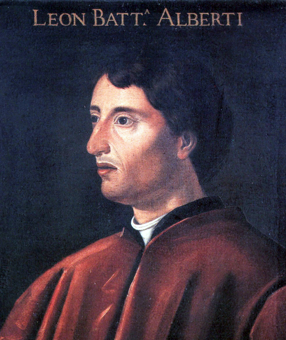 Leone Battista Alberti